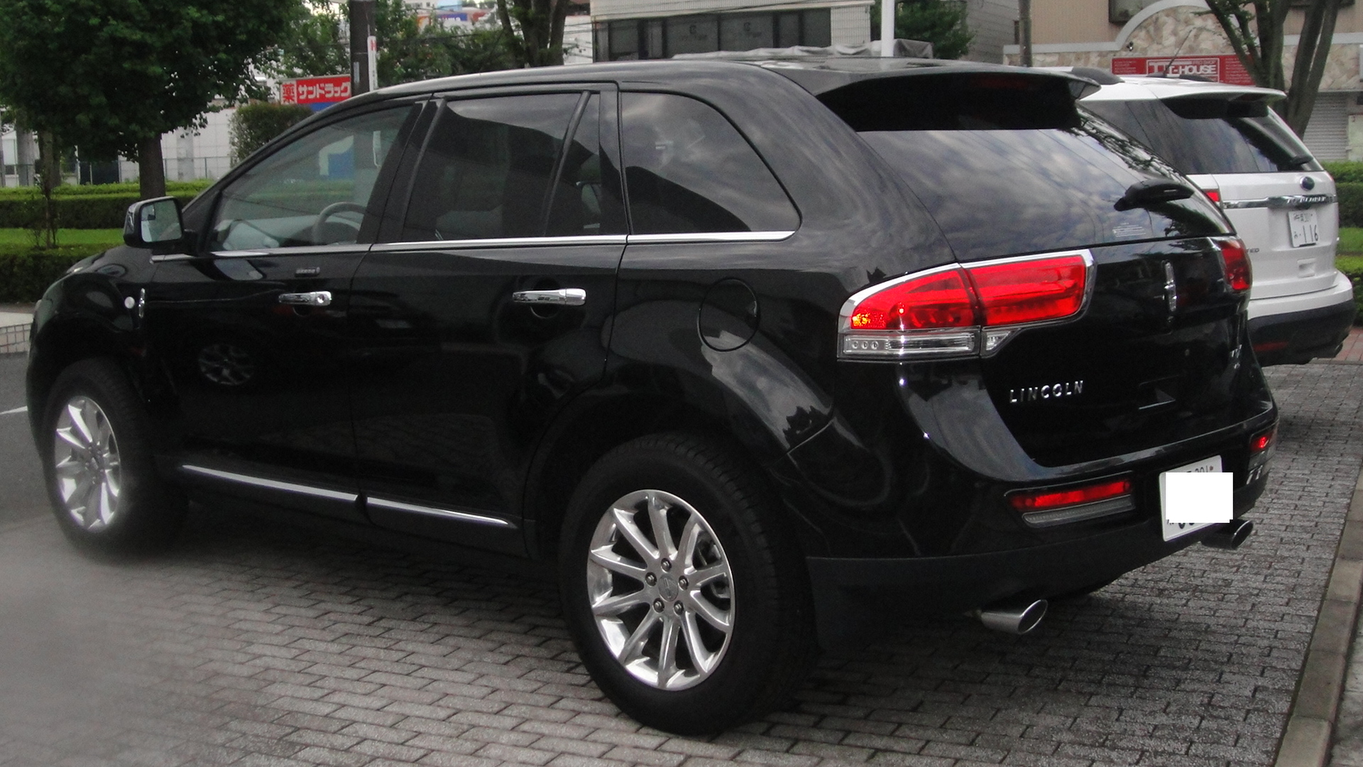 リンカーンMKXリア